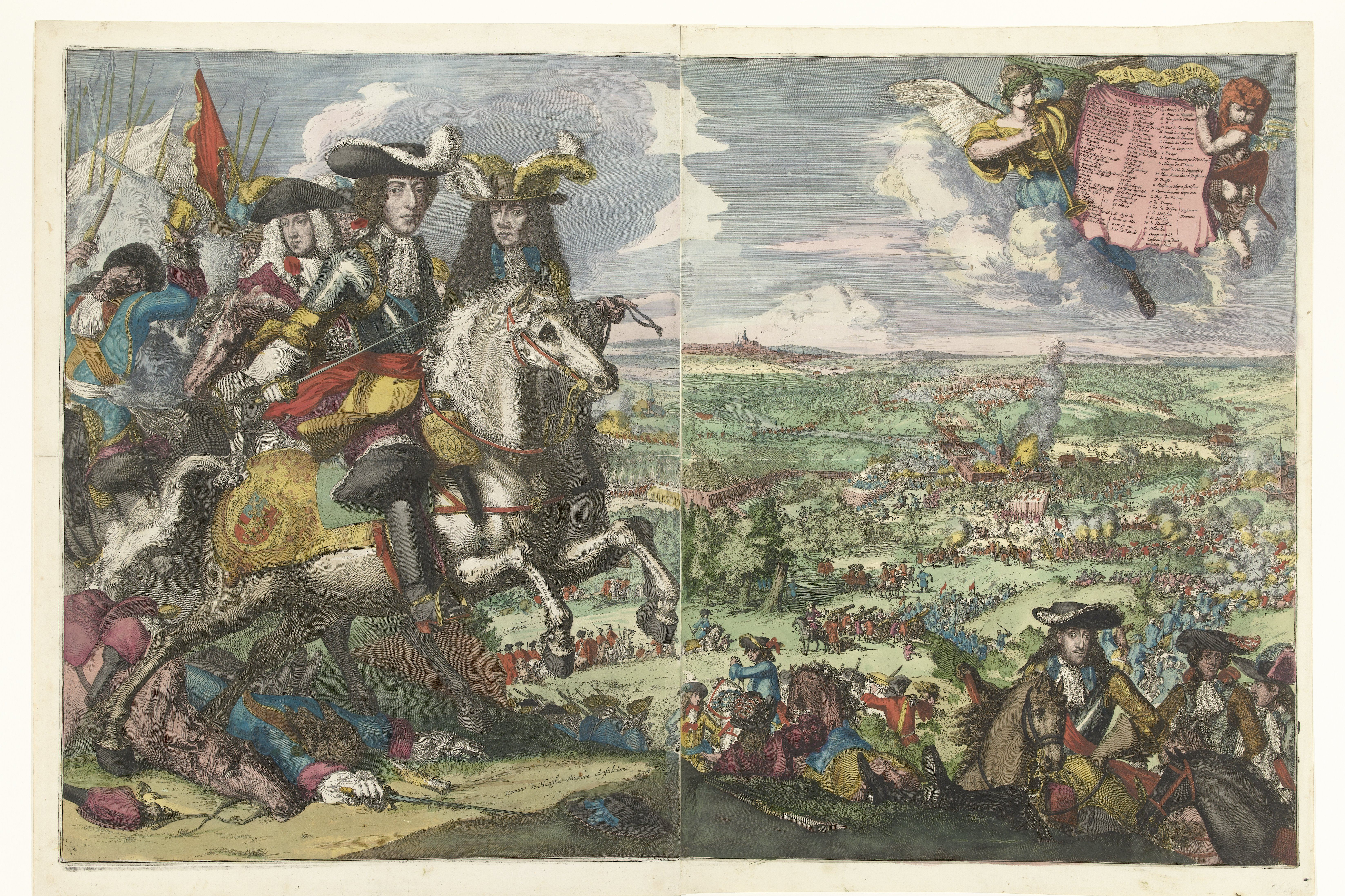 Ingekleurde Dubbelplatige prent